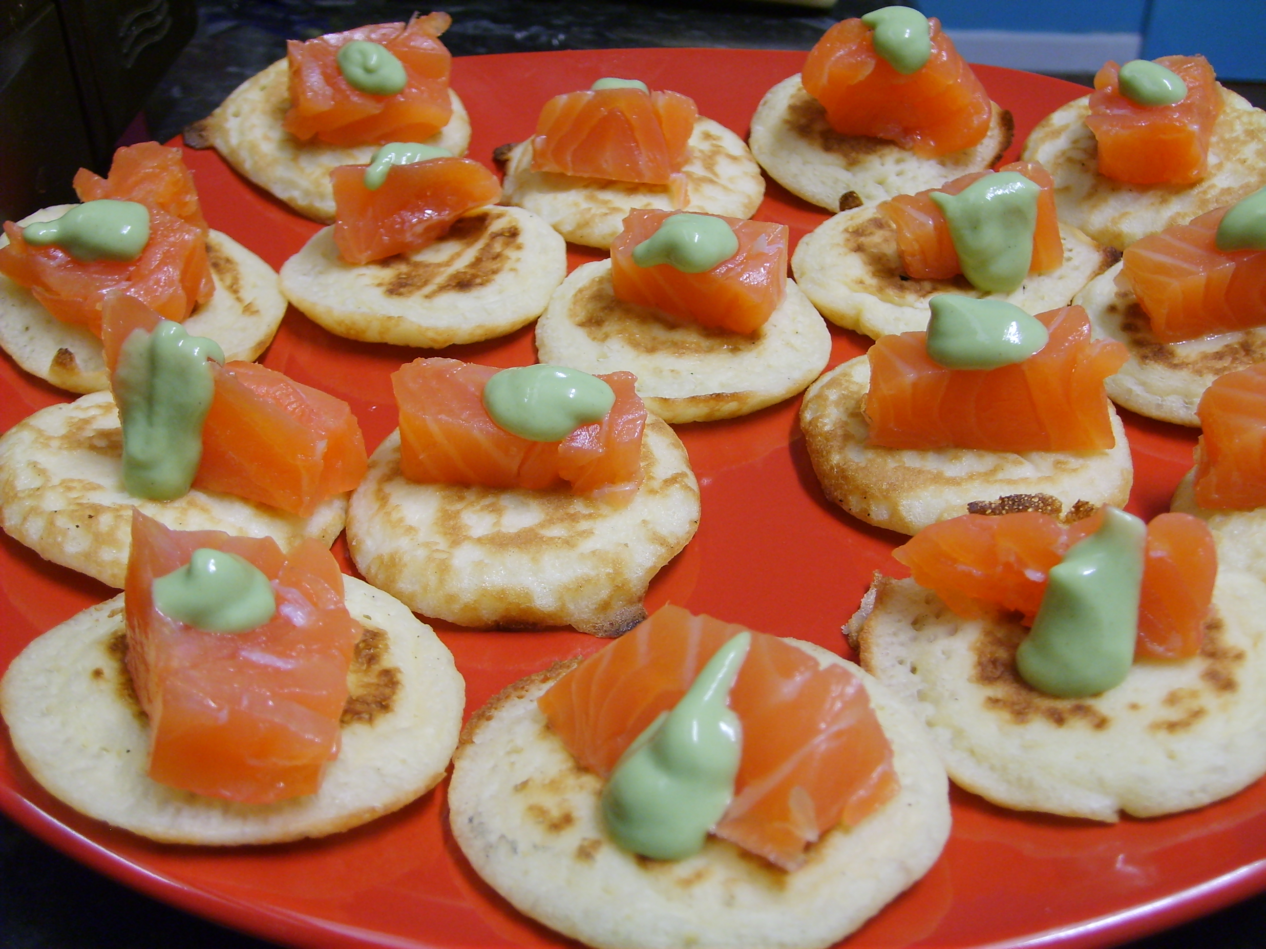 salmon and wasabi mustard on mini blinys